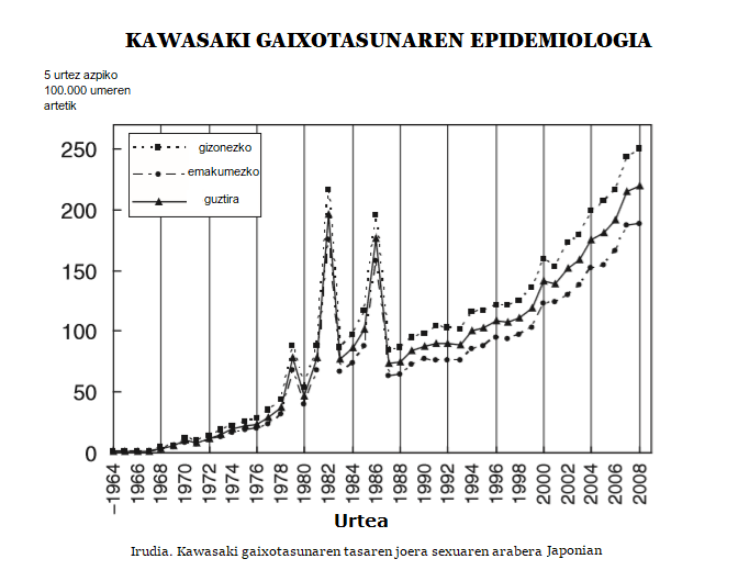 Kawasaki gaixotasunaren kasuen grafikoa Japonian